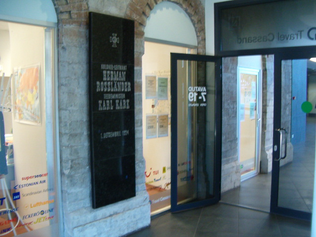 Mälestustahvel kolonelleitnant Hermann Rossländerile ja teedeminister Karl Kargule.